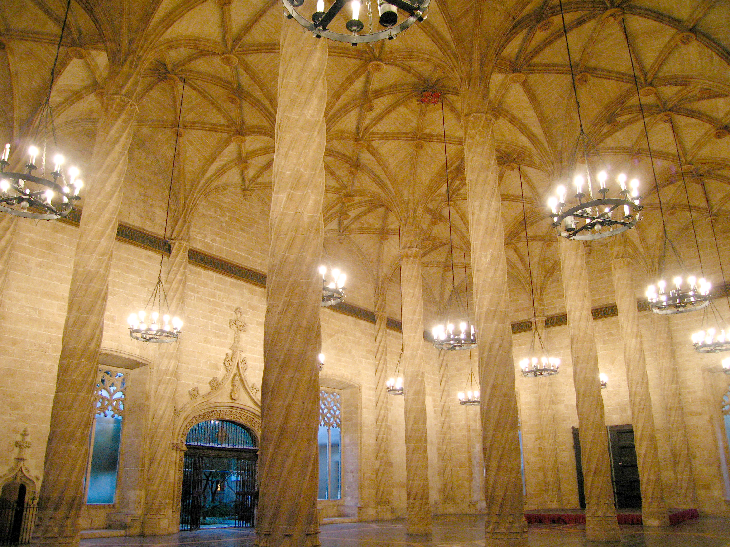 Saló Columnari de la Llotja de la Seda (València). Hall of Columns in the Silk Exchange (Lonja de la Seda) of Valencia